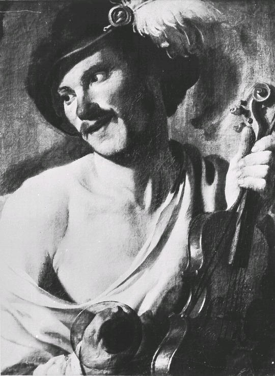 Geigenspieler mit Glas. 75 x 59 cm, Inventar-Nr. GK 177